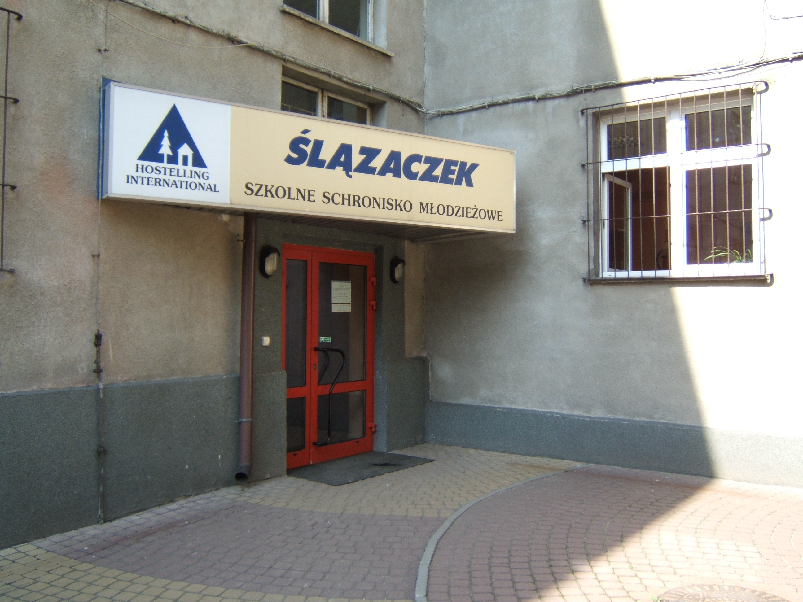 Schronisko Śląskich Technicznych Zakładów Naukowych